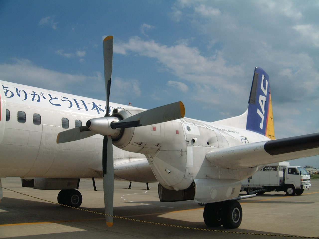 YS-11 左プロペラ